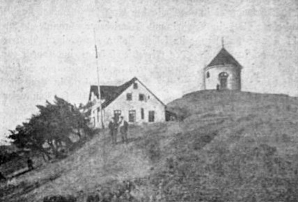 Das erste Unterkunftshaus von 1873 auf dem Mědník (Kupferhübel) im Böhmischen Erzgebirge.